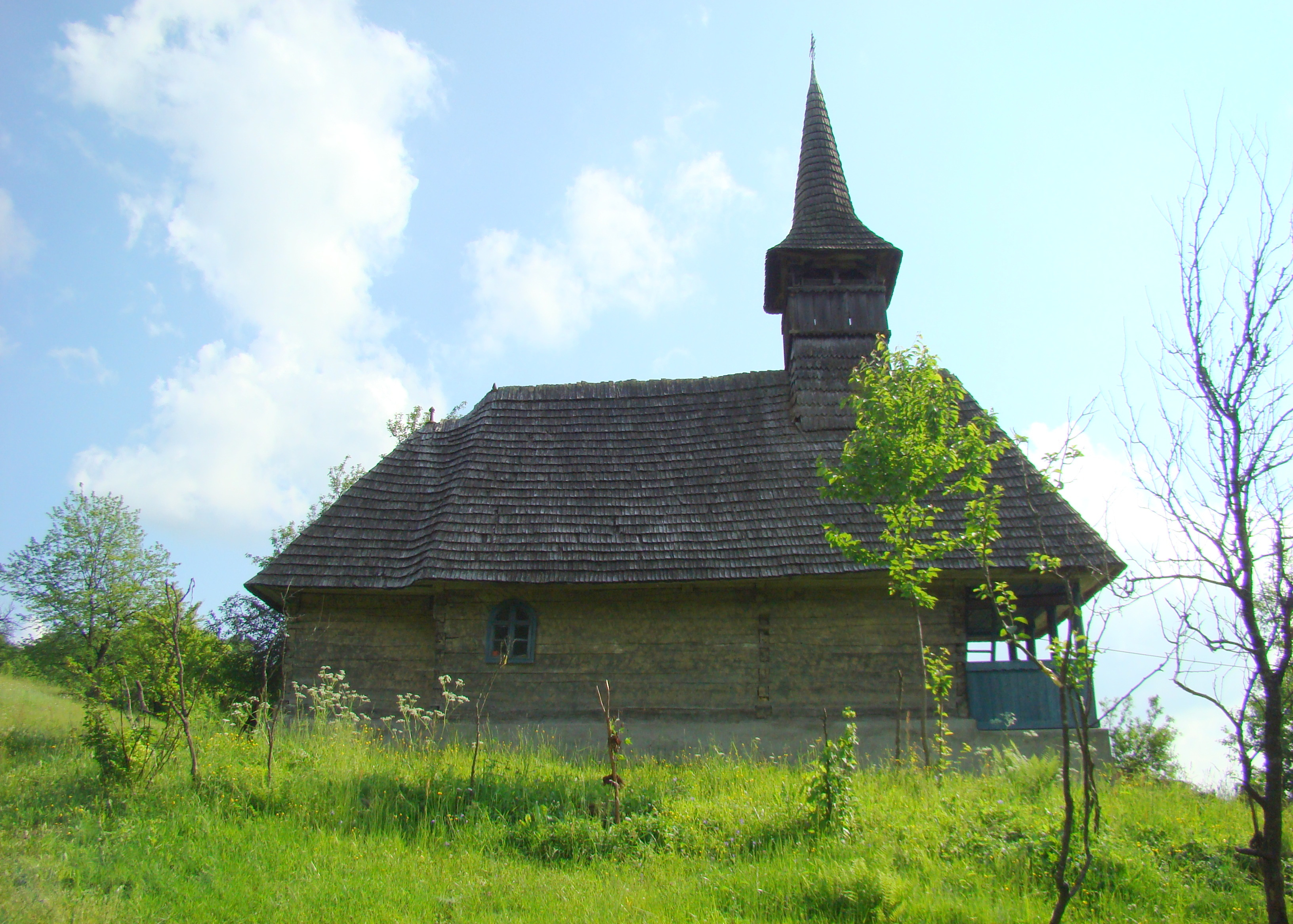 Biserica de lemn "Sf. Ioan Evanghelistul" , sat IZVOARELE; comuna CERNEŞTI